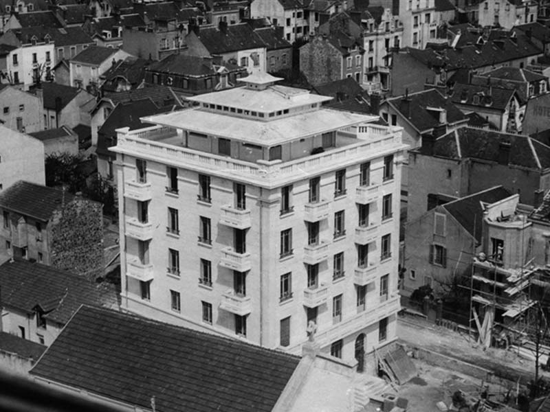 la Maison du Missionnaire lors de l'achèvement de sa construction en 1931 ; vue aérienne prises du haut des anciens "Bains-Callou"